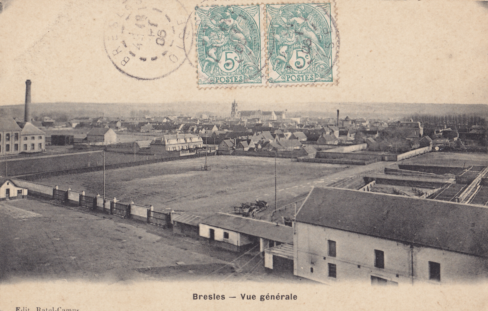 Carte postale ancienne éditée par Ratel-Camus : BRESLES - Vue générale